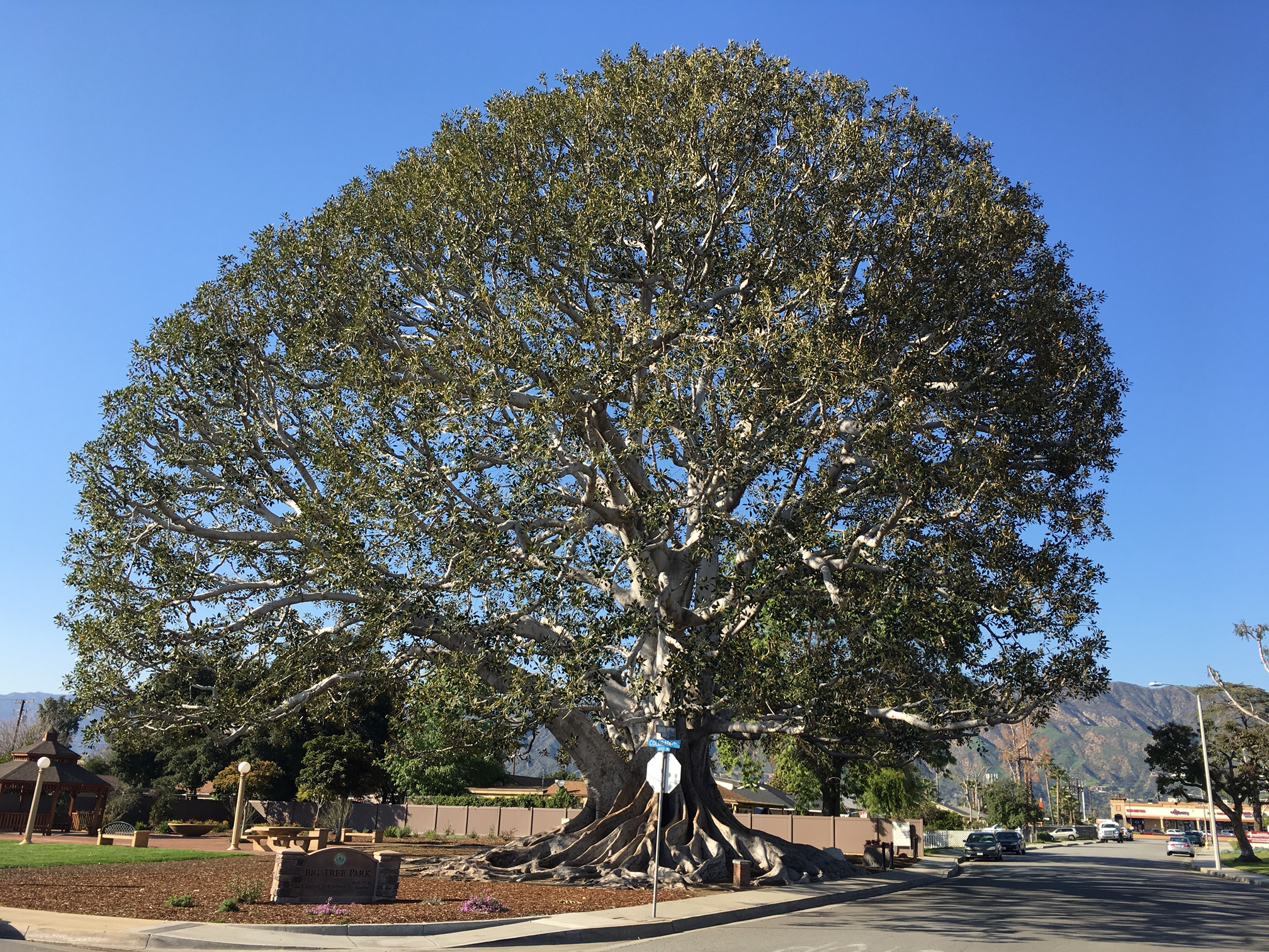 Big Tree Park in Glendora